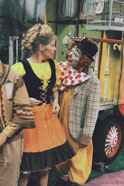 Mamaloe en pipo, personages uit Pipo de Clown; Opname uit de beeldengeluidwiki.nl Op de set van Pipo de Clown (VARA, 1973). Archief Beeld en Geluid, catalogusnummer 73521 kb 6 fotonummer 7